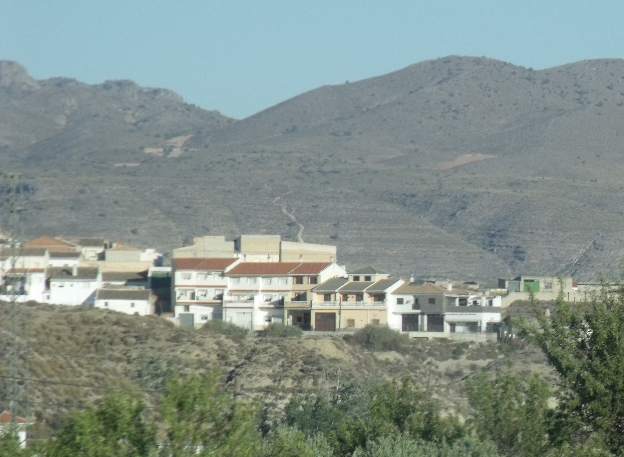 Vista general